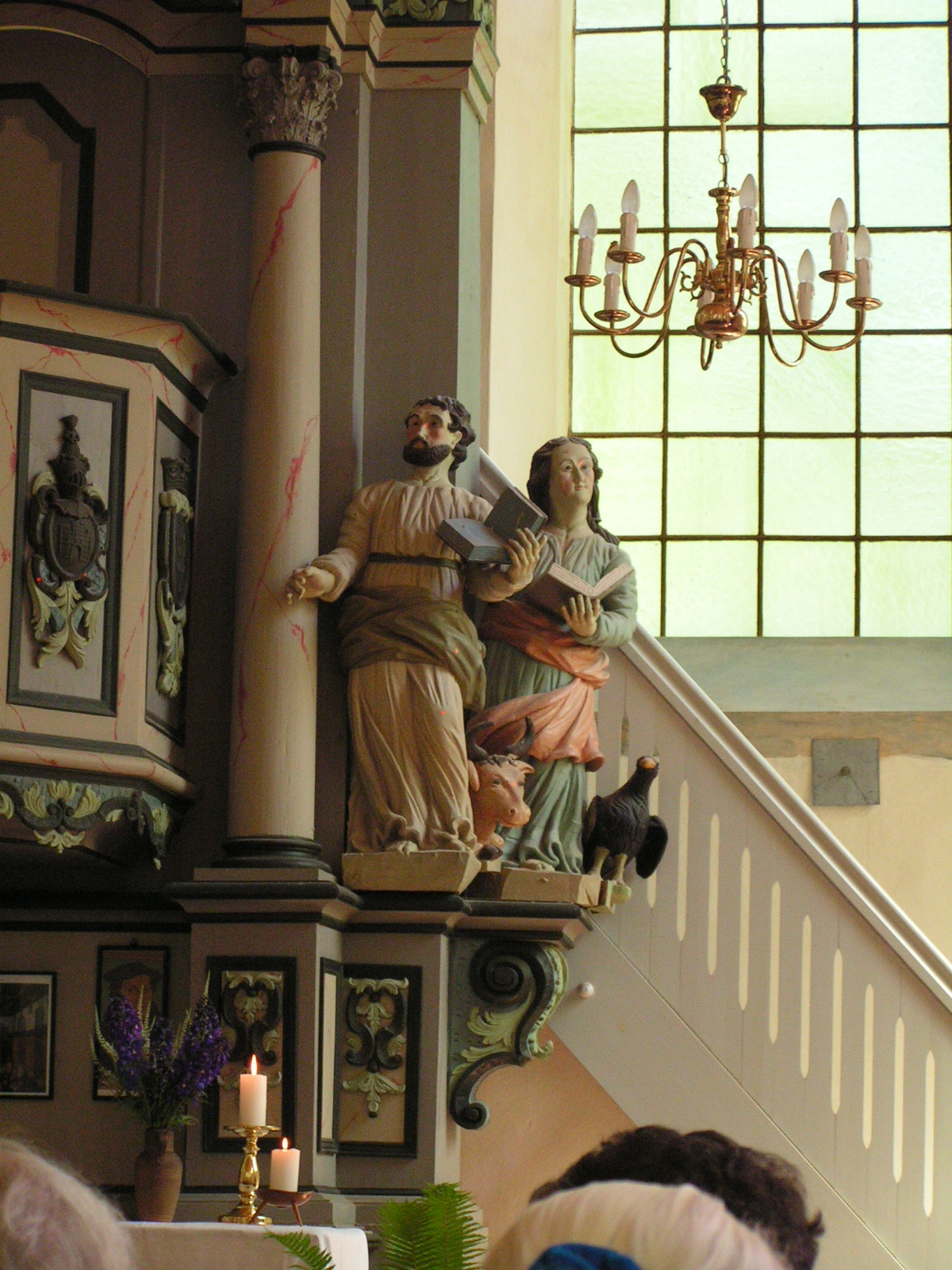 Ev. Kirche in Fincken, Detailansicht des Inneren